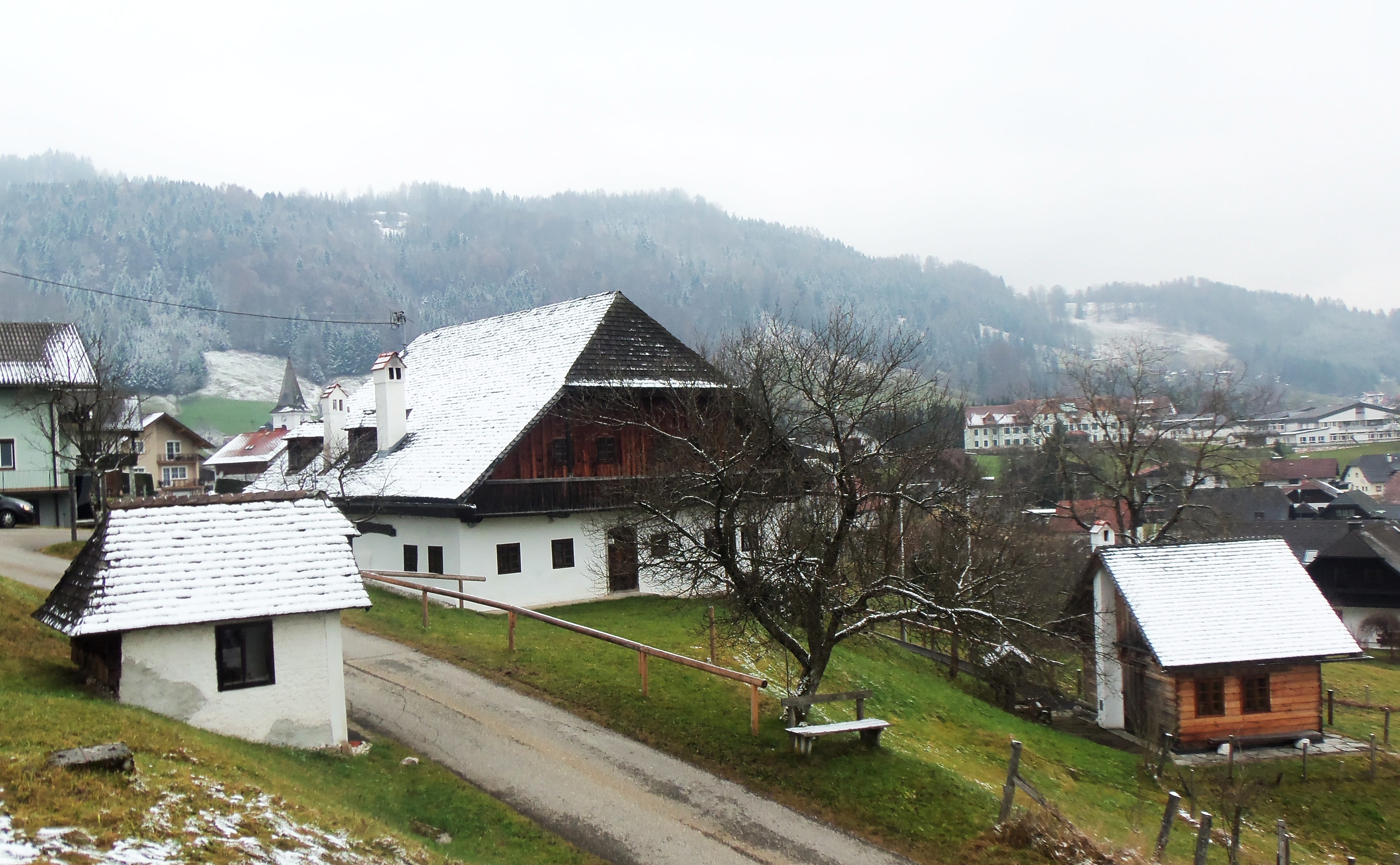 Heimathaus, die Kapelle Rabenwies Links und die Werkstatt recht